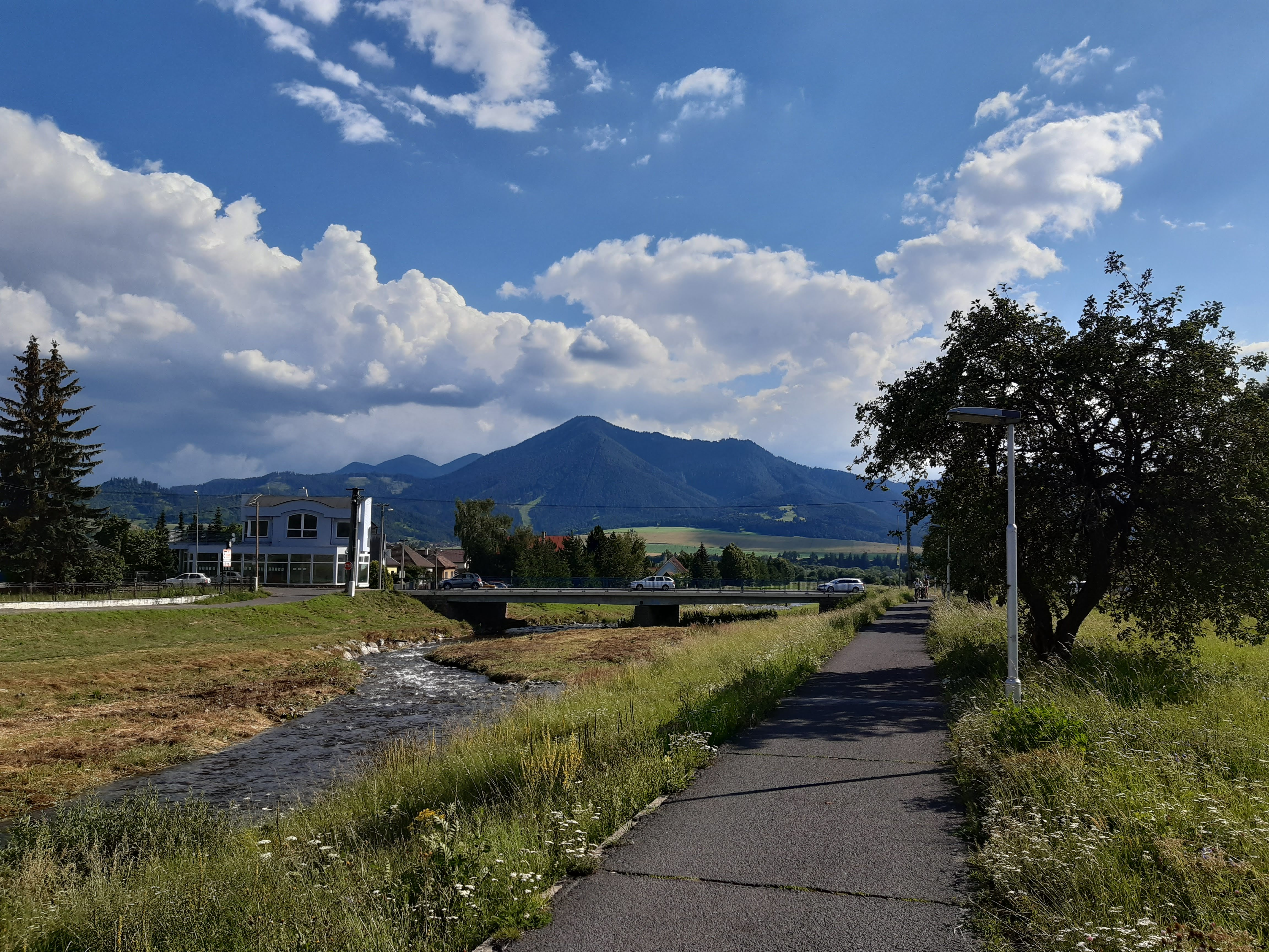 Vrch Poludnica pri pohľade z mikulášskeho sídliska Podbreziny.